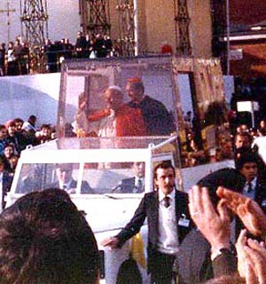 Il Papa Giovanni Paolo II durante la sua visita a Milano, nel 1984, con il Cardinal Carlo maria martini